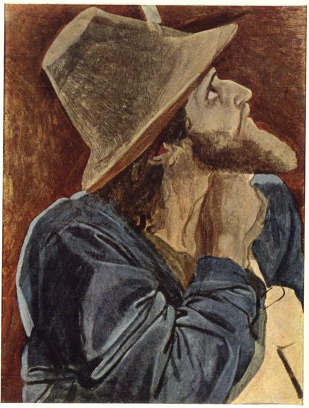 Путешественник. Государственная Третьяковская галерея